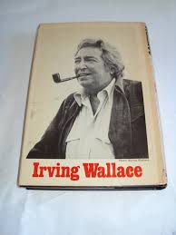 Imagem da minha cópia do livro "The R Document".